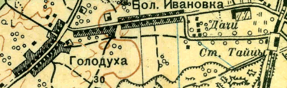 Топографическая карта Ленинградской области, квадрат О-36-13-А-а (Большая Пудость), деревня Большая Ивановка